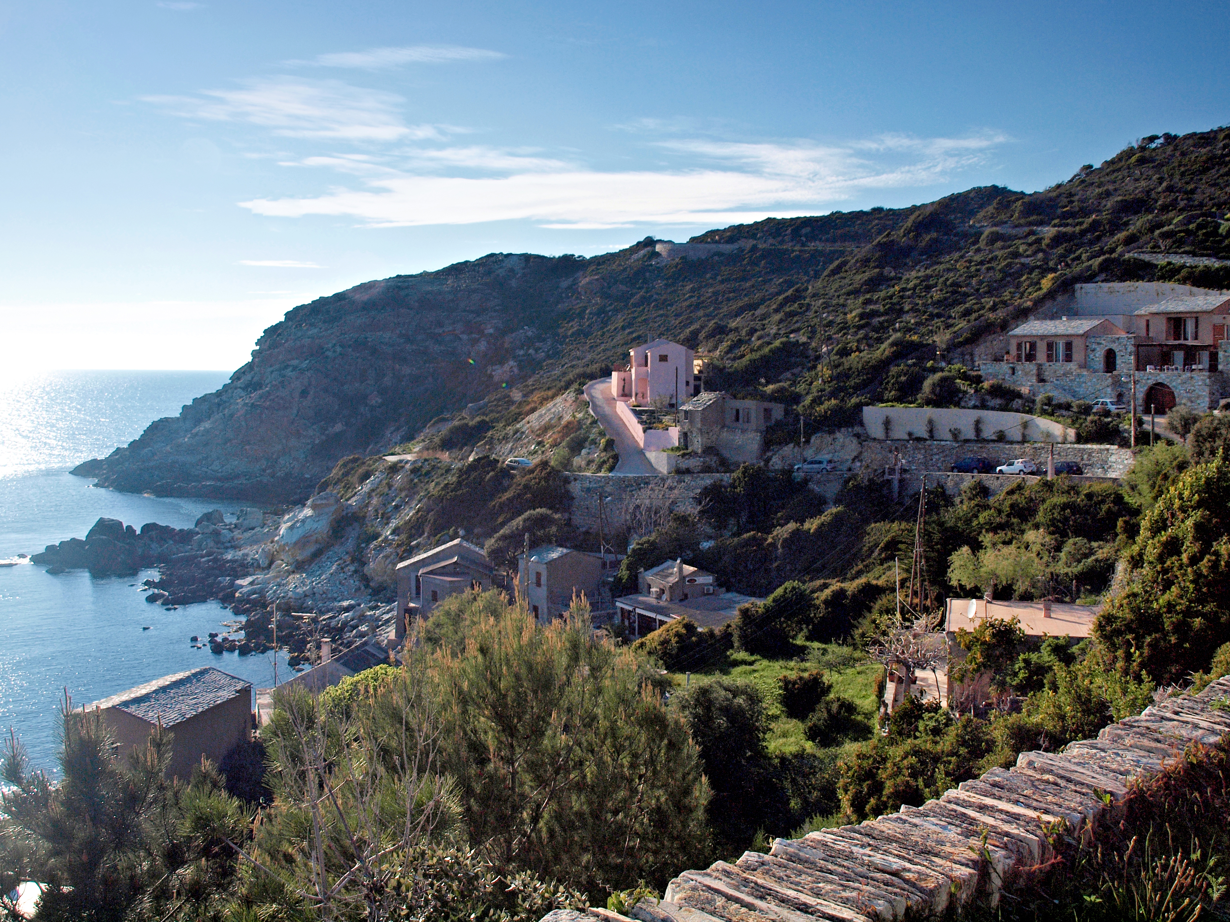 Canari (Corsica) - Marine de Canelle